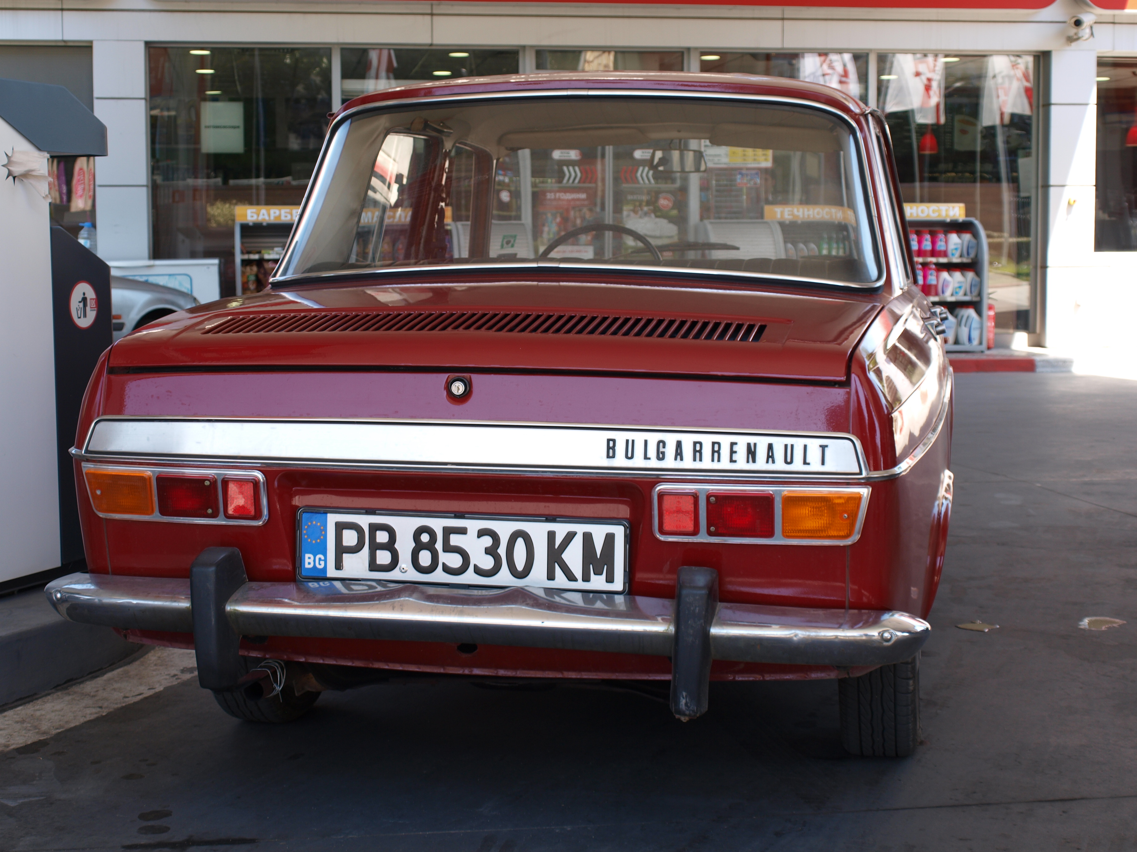 Vue AR Renault 10 BULGARRENAULT à Plovdiv, juillet 2016. Contrairement à la Roumanie voisine où l'ex-Régie est implantée depuis fin des années 60 avec son partenaire Dacia, la mayonnaise n'a jamais pris de l'autre côté du Danube. Il reste aujourd'hui quelques exemplaires de cette aventure industrielle en circulation, de véritables curiosités témoins d'une époque révolue...